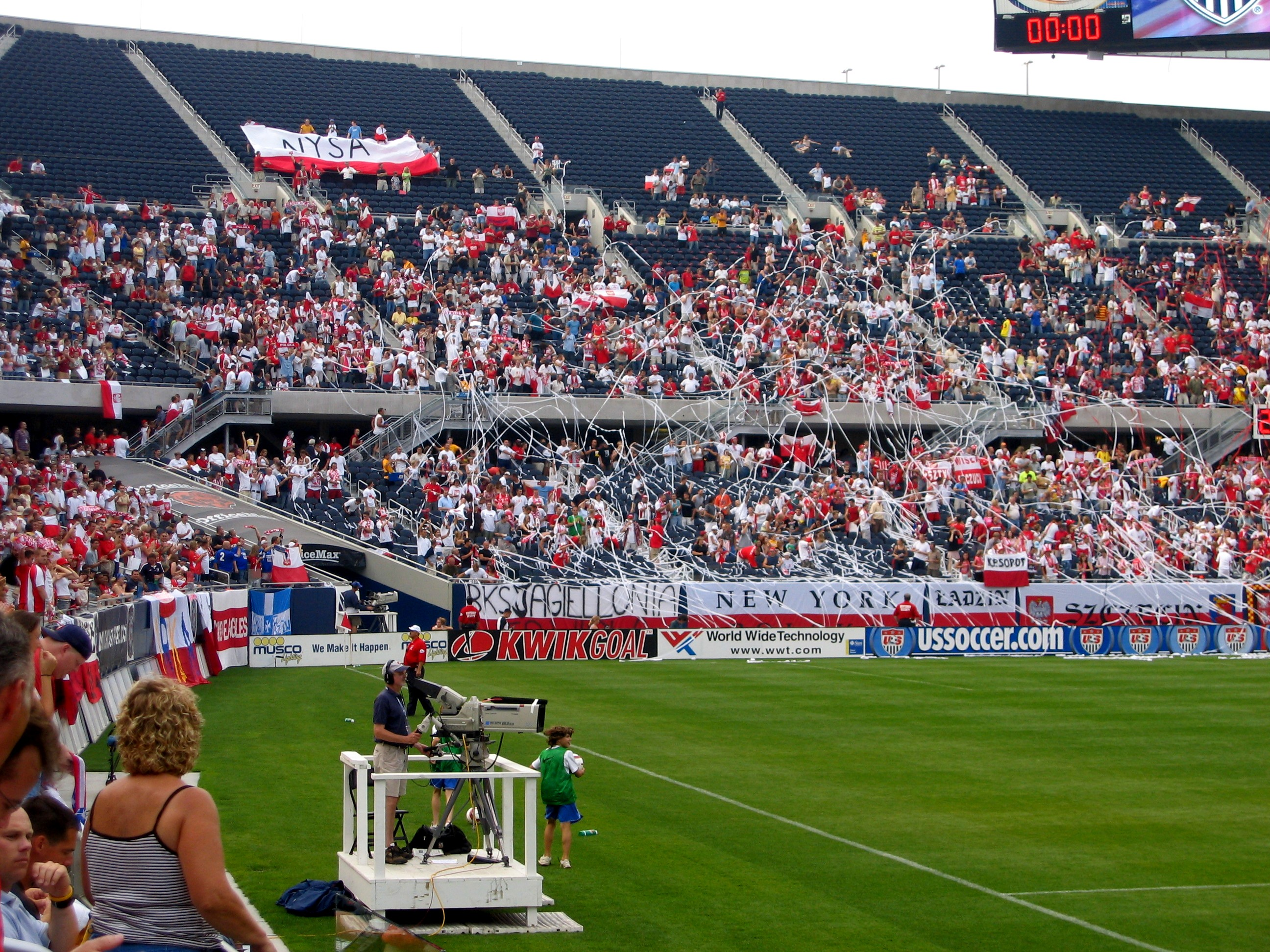 États-Unis contre Pologne en 2004. Supporters polonais au Soldier Field.